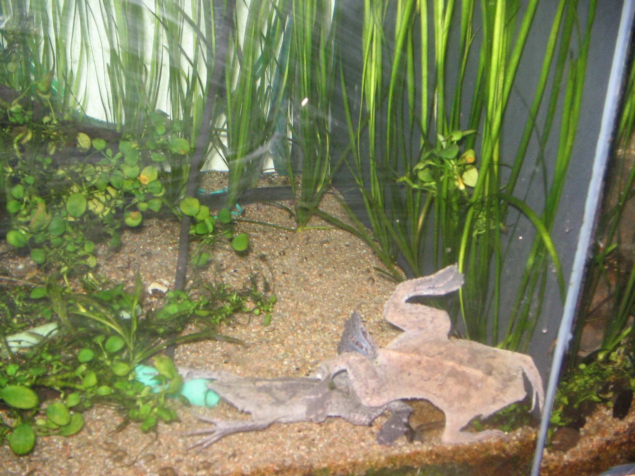 Pipa pipa